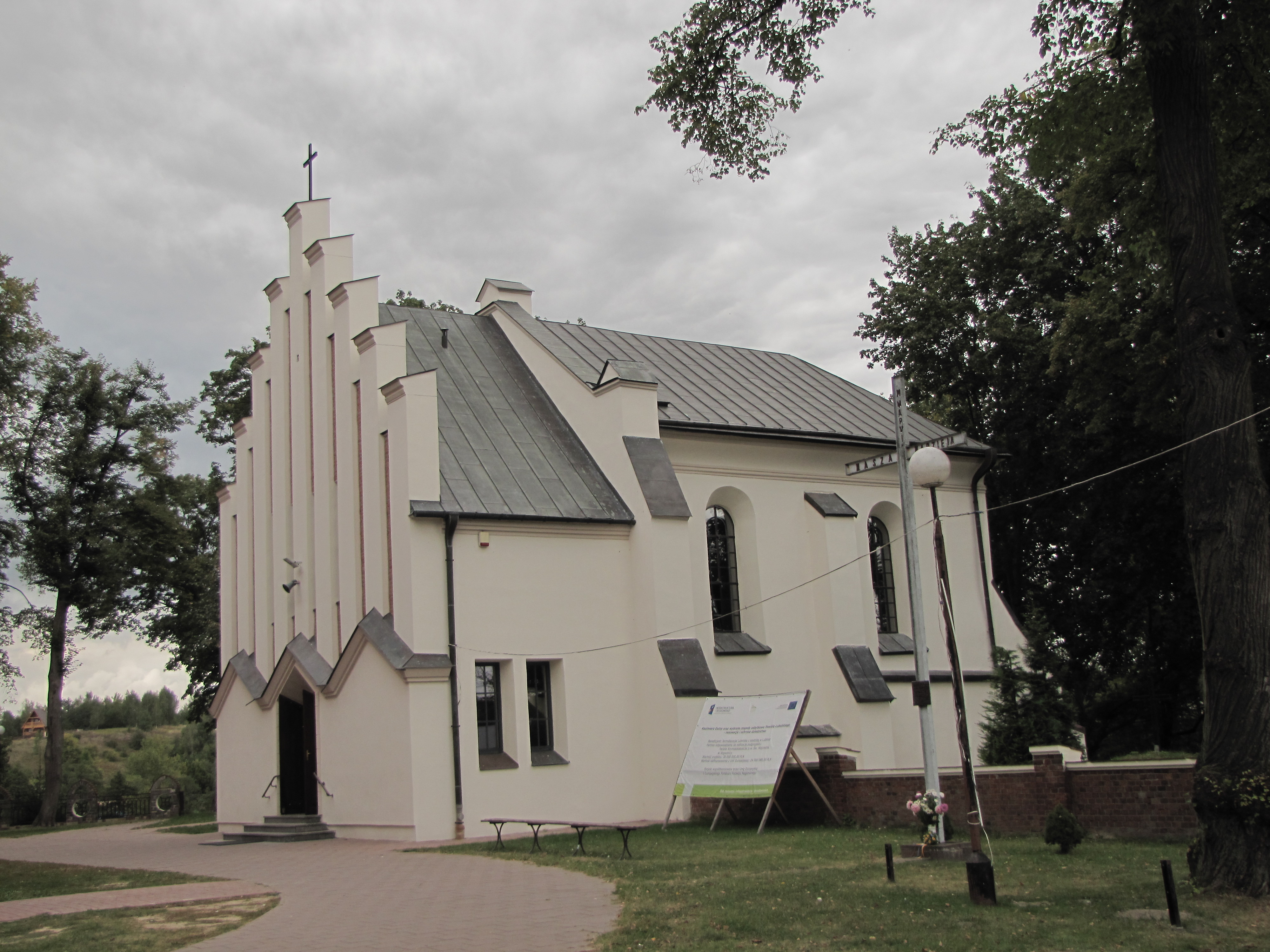 zespół kościoła p.w. św. Wojciecha Wąwolnica kaplica Matki Boskiej Kębelskiej przy kościele